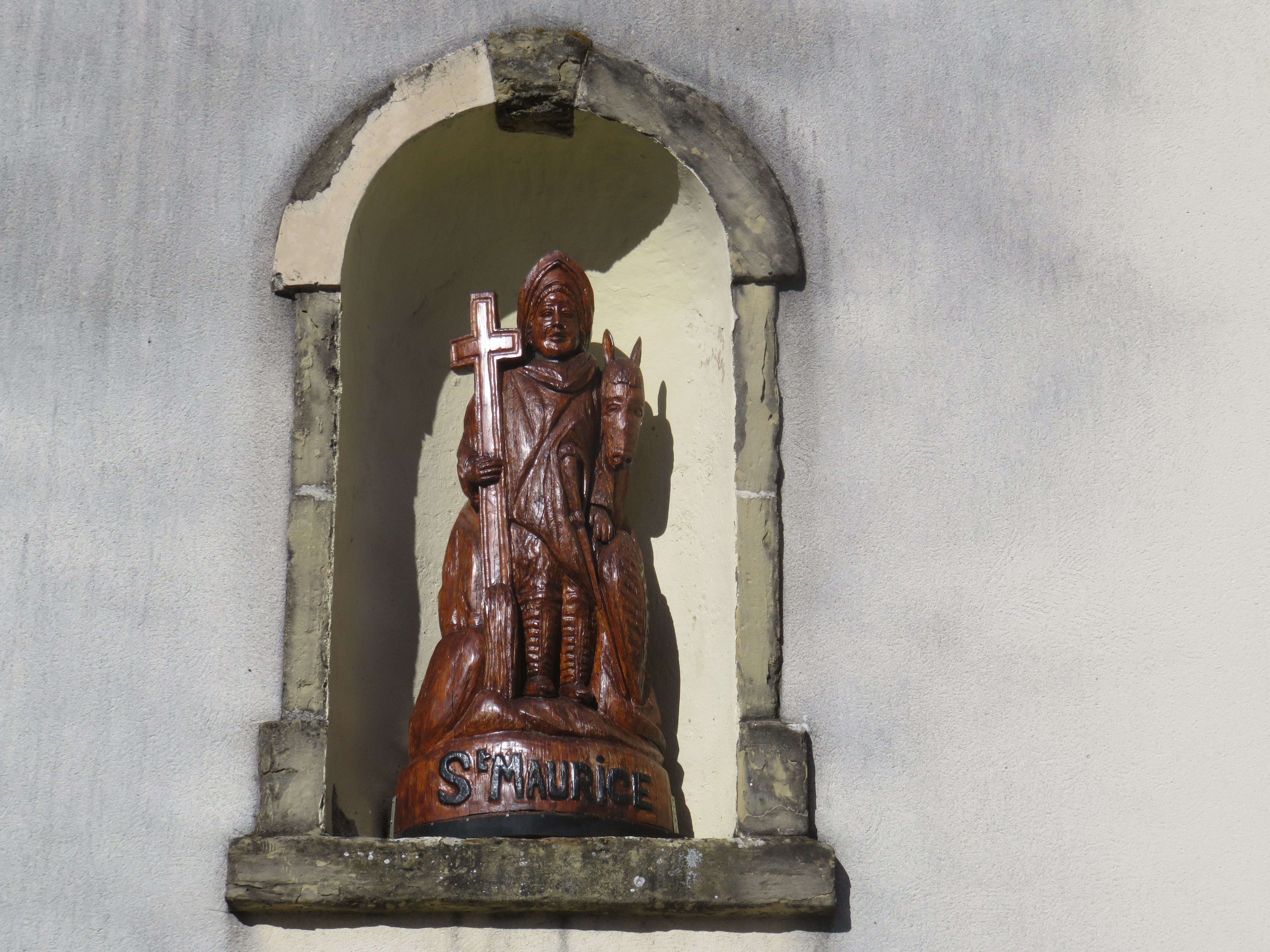 Une statue de saint Maurice sur la façade de l’église Saint-Maurice (Marcellaz-Albanais, France) le 23 février 2020.